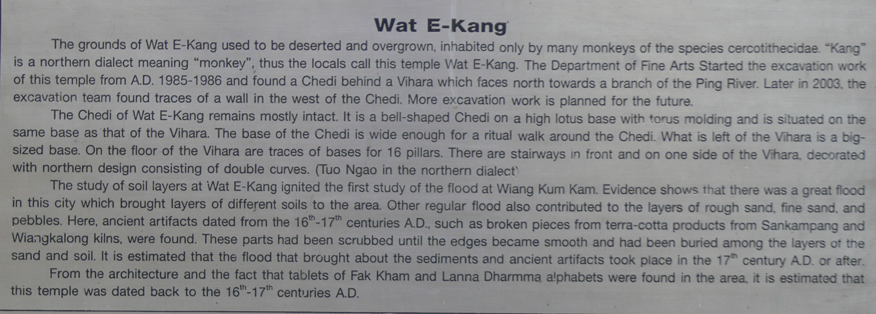 Info over de tempel die ter plekke beschikbaar is. 2-talig: Thais en Engels. Dit is de complete Engelse tekst.